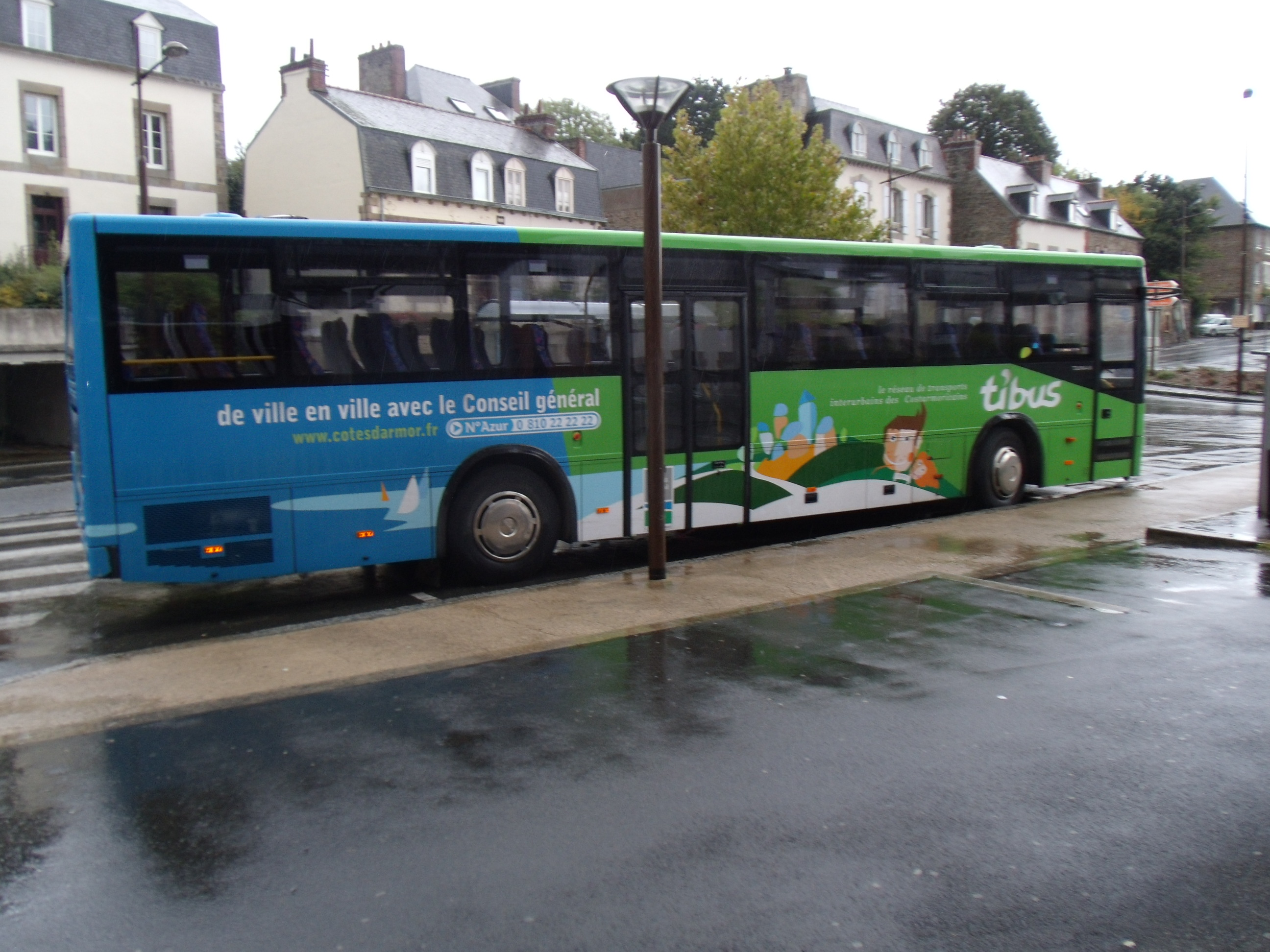 Un car Tibus, le réseau des transports interurbains dans le département des Côtes-d'Armor, en Gare de Lannion, effectuant une mission sur la ligne 15.